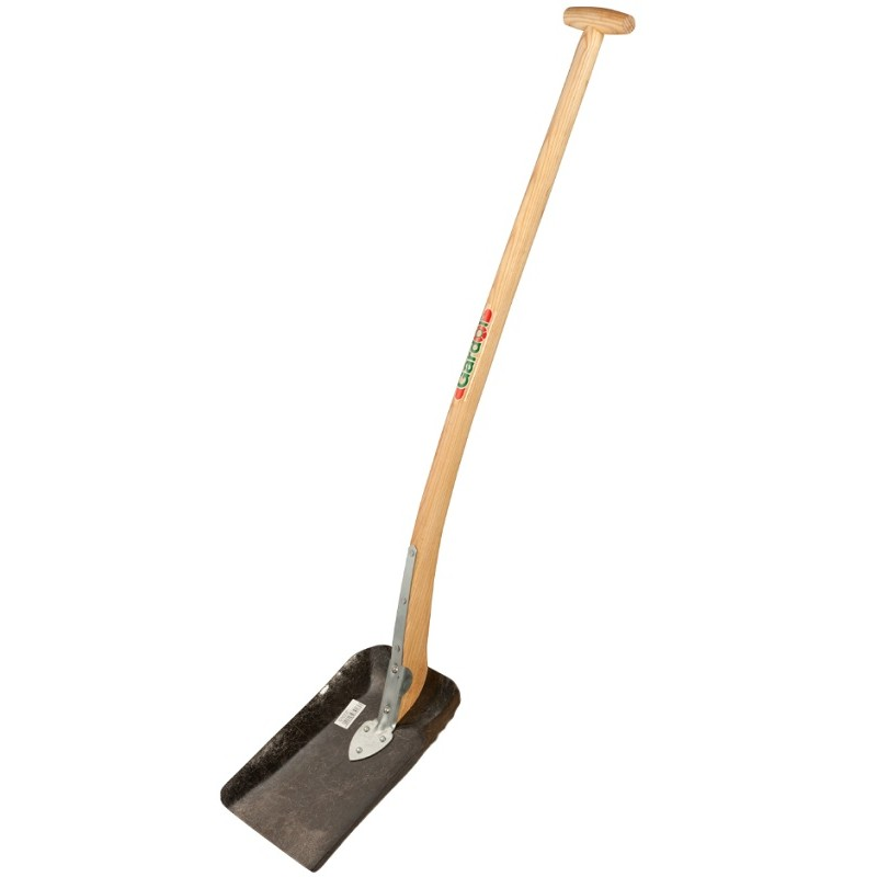 En skovl.